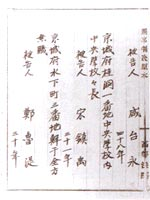 한국의 독립운동가 송진우, 함태영(3대 부통령 역임)에게 발부된 체포장(1919년)